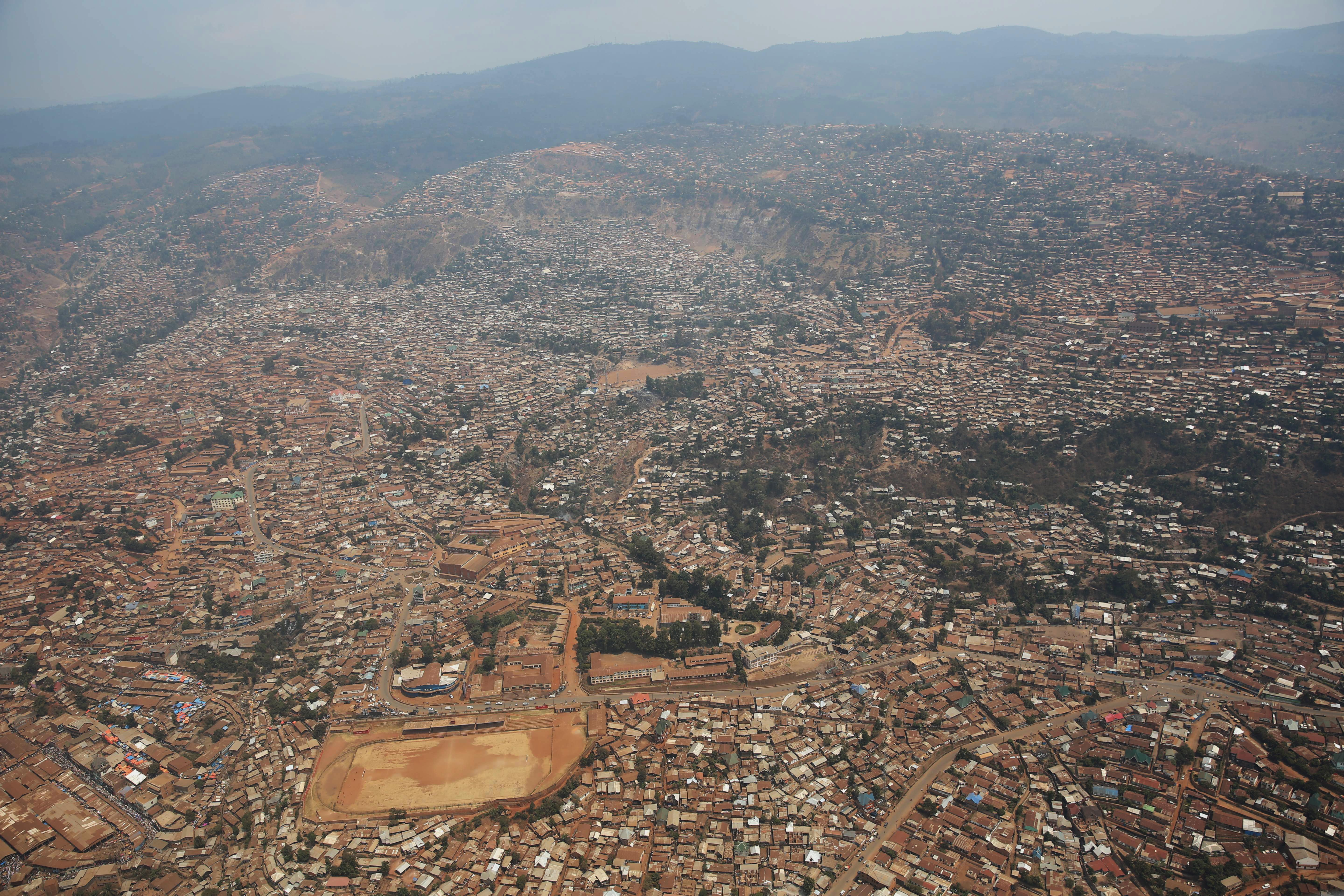 photo MONUSCO / Abel Kavanagh